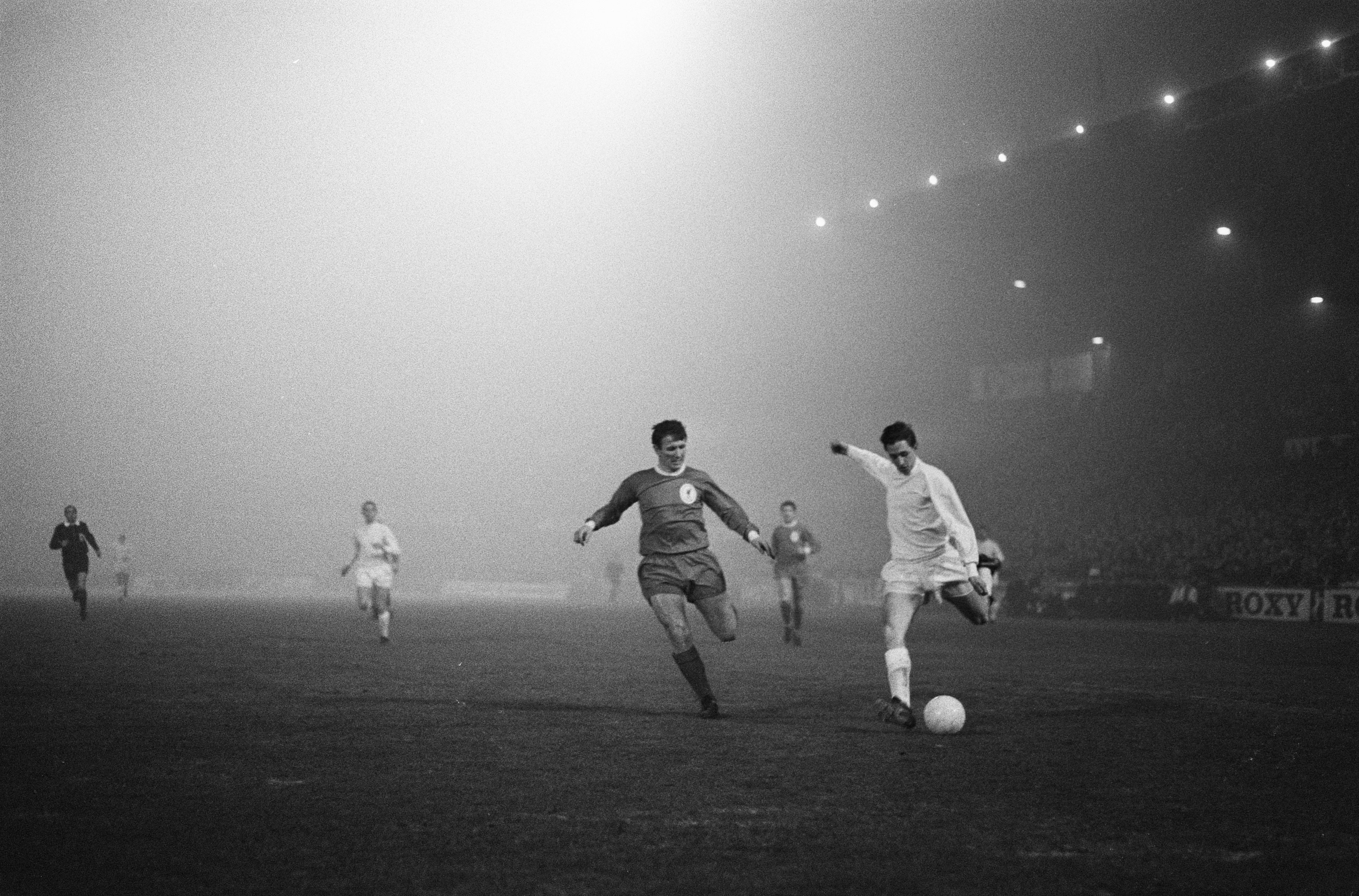 Collectie / Archief : Fotocollectie Anefo Reportage / Serie : [ onbekend ] Beschrijving : Europacup I. Ajax tegen Liverpool 5-1, Johan Cruijff in duel Annotatie : Befaamde ´Mistwedstrijd´ Datum : 7 december 1966 Locatie : Amsterdam Trefwoorden : sport, voetbal Persoonsnaam : Cruijff, Johan Fotograaf : Nijs, Jac. de / Anefo Auteursrechthebbende : Nationaal Archief Materiaalsoort : Negatief (zwart/wit) Nummer archiefinventaris : bekijk toegang 2.24.01.05 Bestanddeelnummer : 919-8589